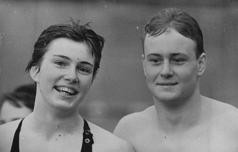 Ute Noack, Frank Wiegand Zentralbild Dressel 1.4.1962 Ute Noack stellte Europarekord ein Den Europarekord im 100-m-Delphinschwimmen der Holländerin-Heemskork-verbesserte am 1.4.62 die Berlinerin Ute Noack mit 1:10,04 min. Ute Noack, die an gleicher Stelle erst vor drei Wochen den deutschen Rekord auf 1:11,3 min verbessert hatte, vollbrachte damit die herausragende Leistung am zweiten Tag der Prüfungswettkämpfe des Europameisterschaftskaders im Schwimmen, im Berliner Friedrich-Friesen-Stadion. UBz: Einer der Ersten die Uta Noack (links) zu ihrem Erfolg gratulierte, war Frauke Wiegand.